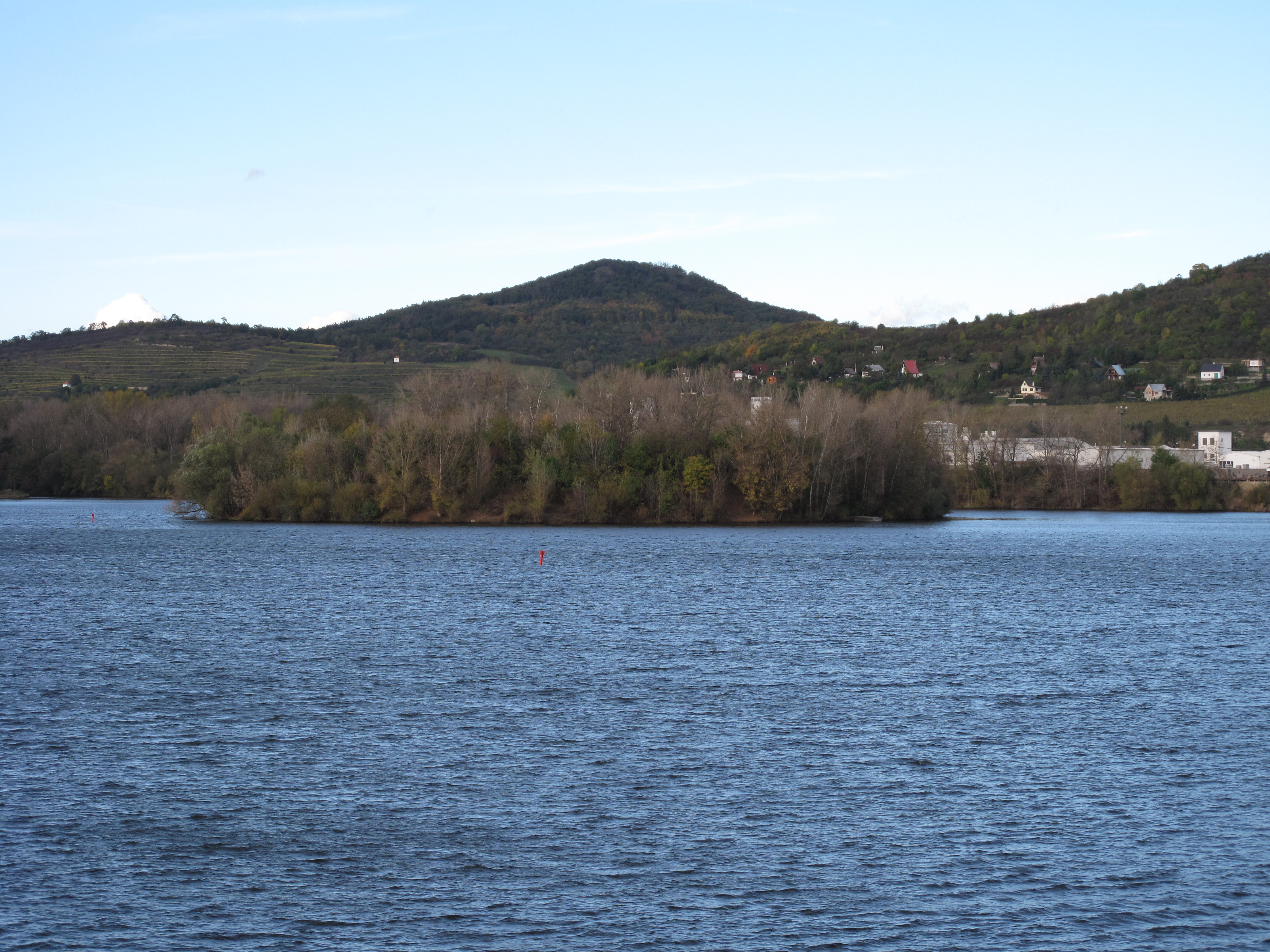 Ptačí ostrov na Žernoseckém jezeře. Okres Litoměřice, Česká republika.